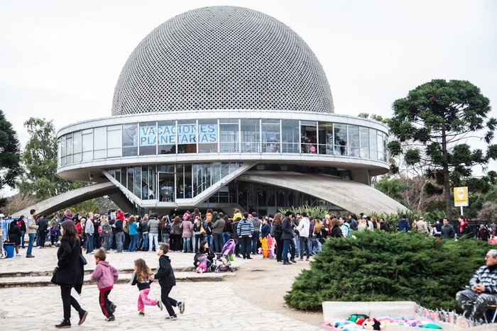 El Planetario de Buenos Aires durante las vacaciones de Verano de 2015.